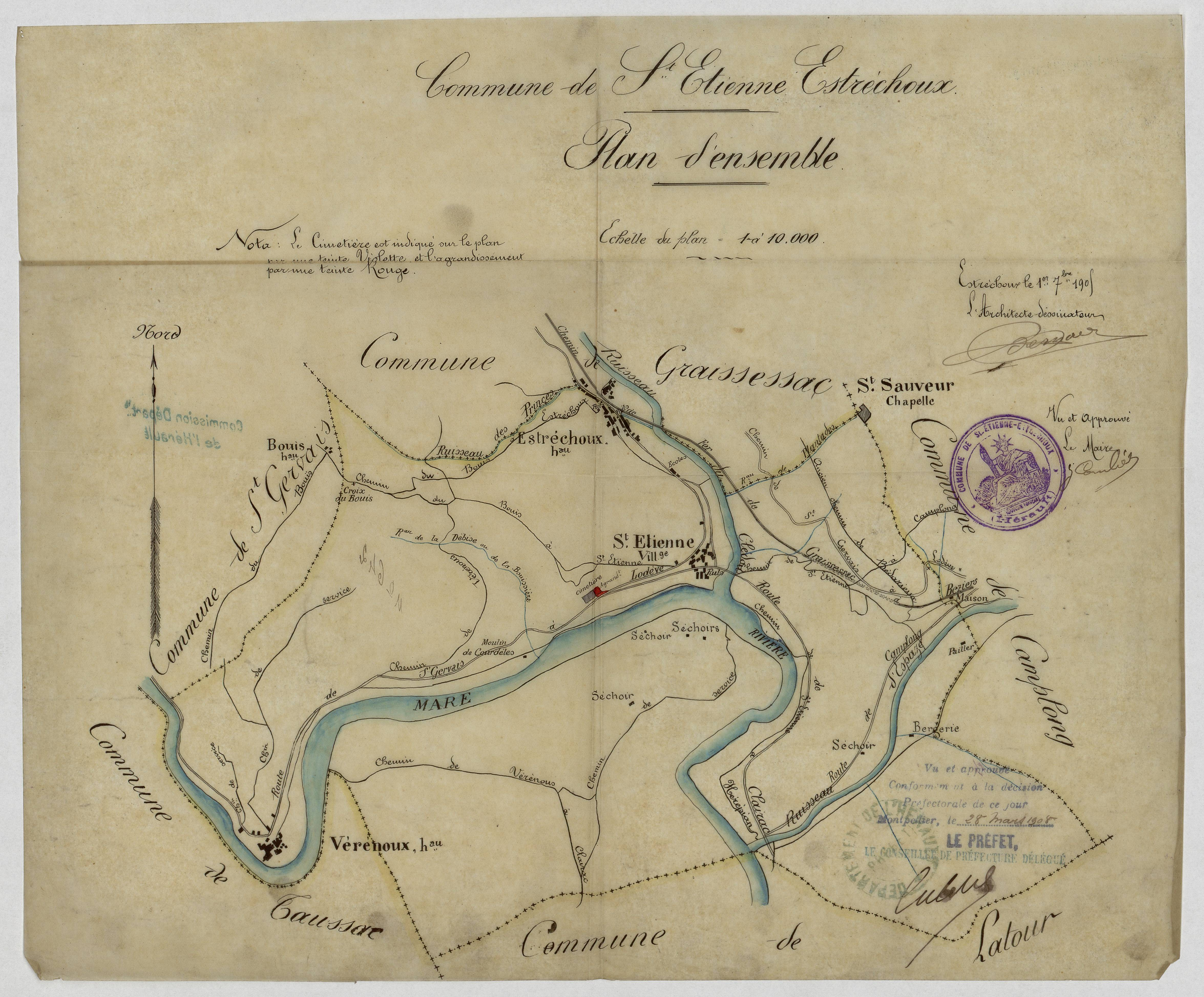 Saint-Étienne-Estréchoux. - Plan d'ensemble de la commune (le cimetière est indiqué sur le plan par une teinte violette et l'agrandissement par une teinte rouge)